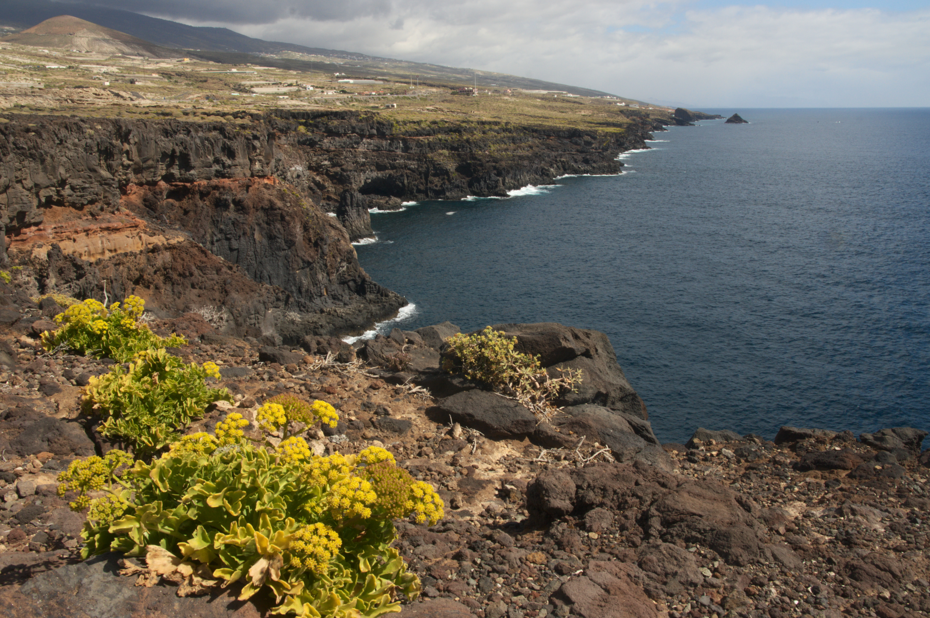 Sitio de Interés Científico del Acantilado de la Hondura en Fasnia, Tenerife.